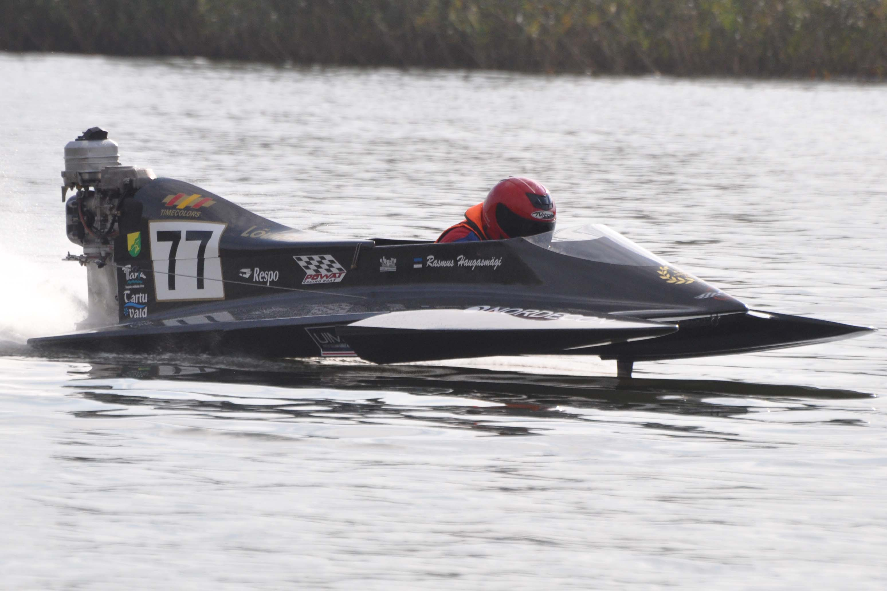 Maailmameister OSY-400